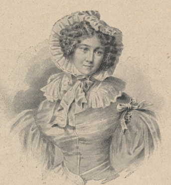 Prinzessin Marianne von Preußen